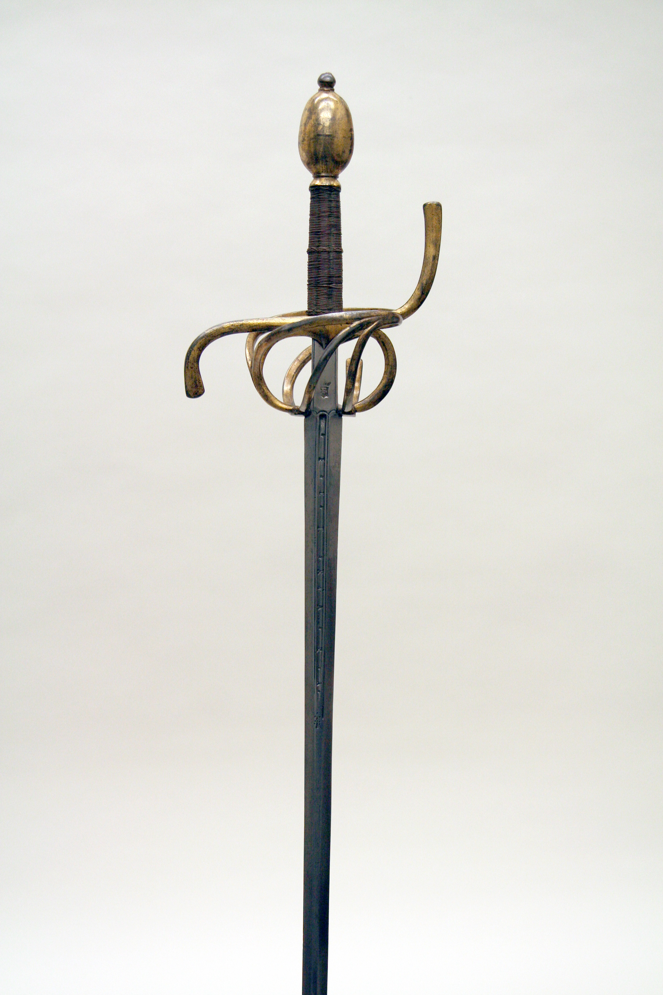 German; Rapier; Swords